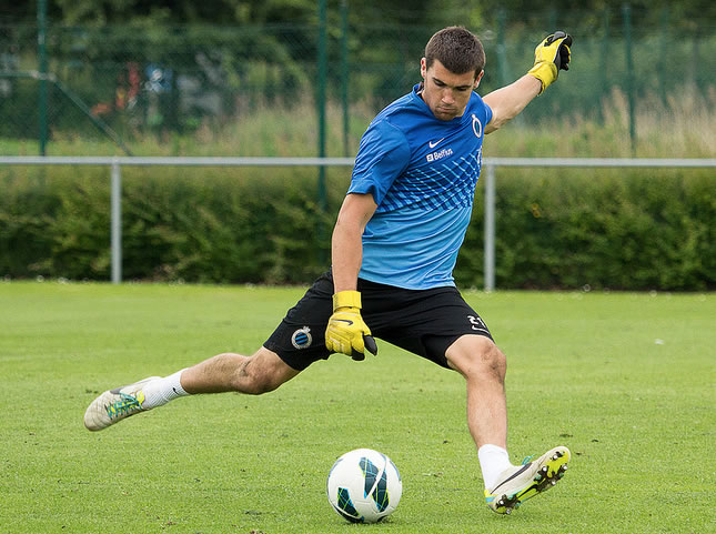 Mathew Ryan, speler van Club Brugge